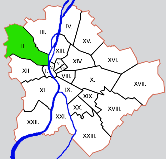 Budapest kerületei: II. kerület